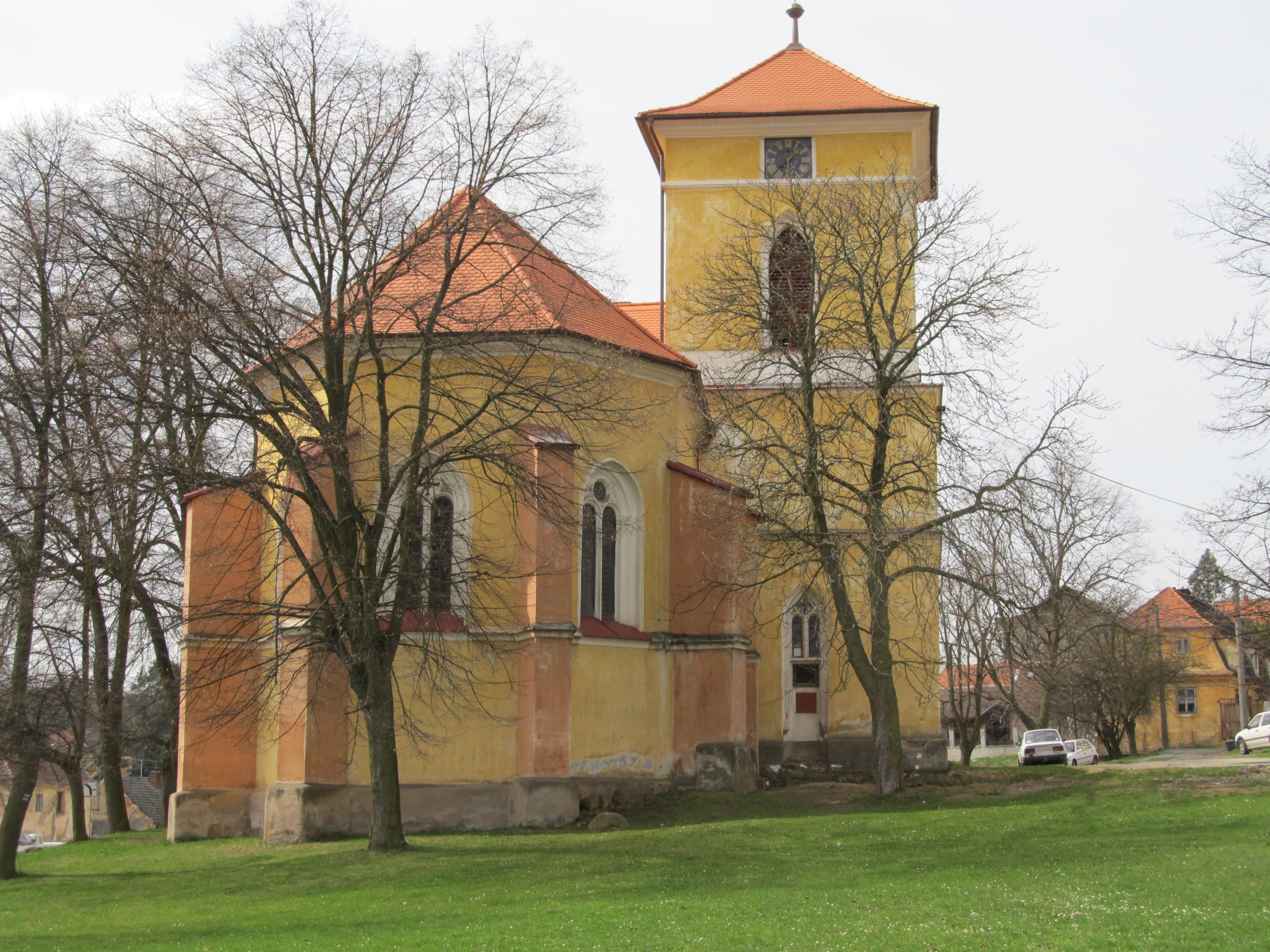 Všeruby - kostel sv. Ducha